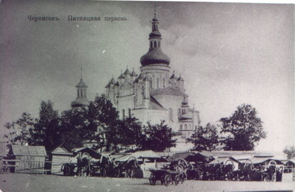 Церква Пятницького монастиря у Чернігові. Дореволюційне фото. Храм був зруйнований гітлеровцями в 1943 р. і відновлений в давньоруських формах П.Барановським.